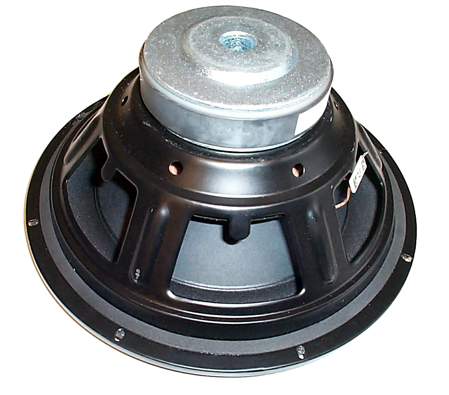 12" Loudspeaker